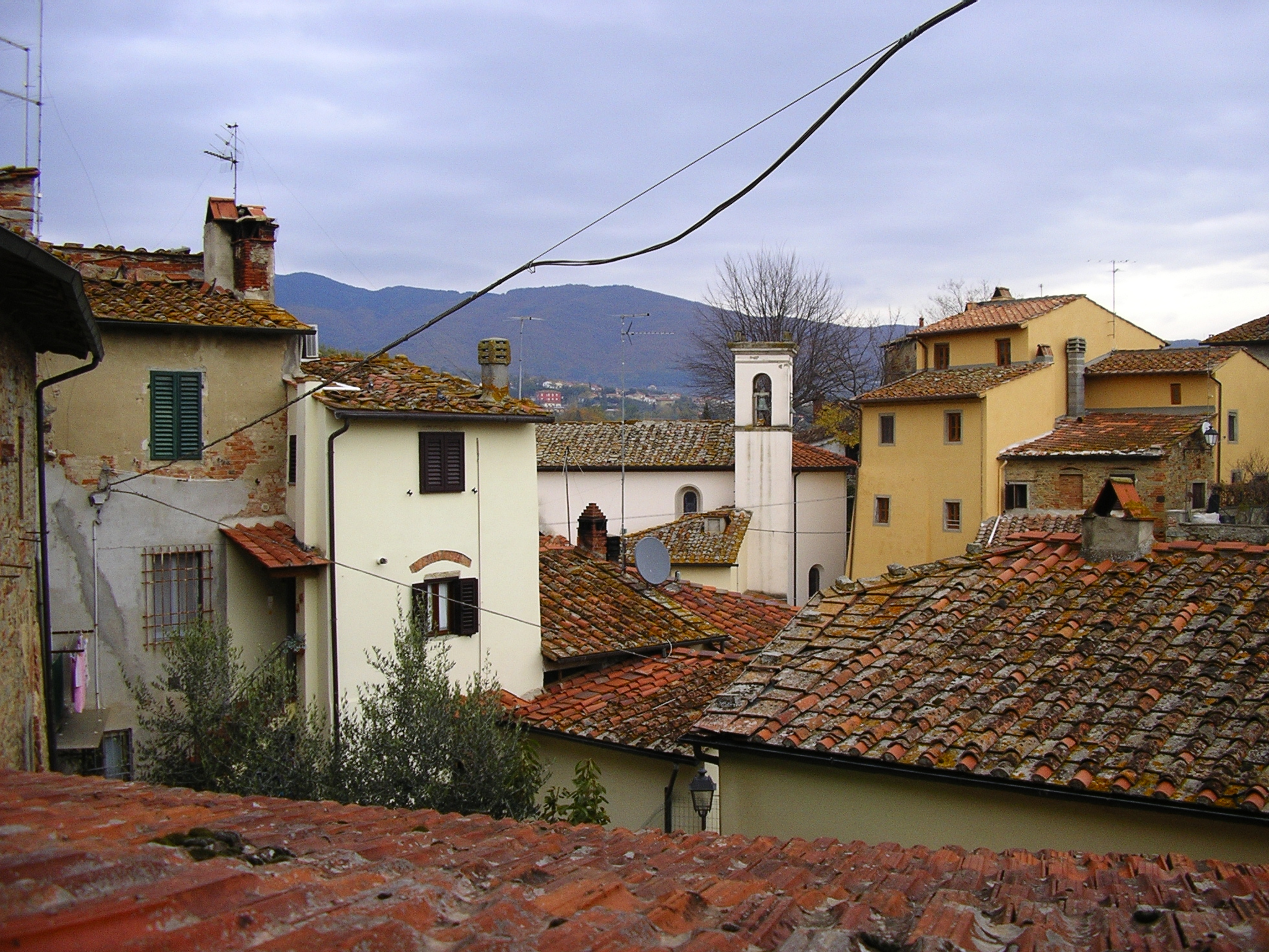 Campogialli